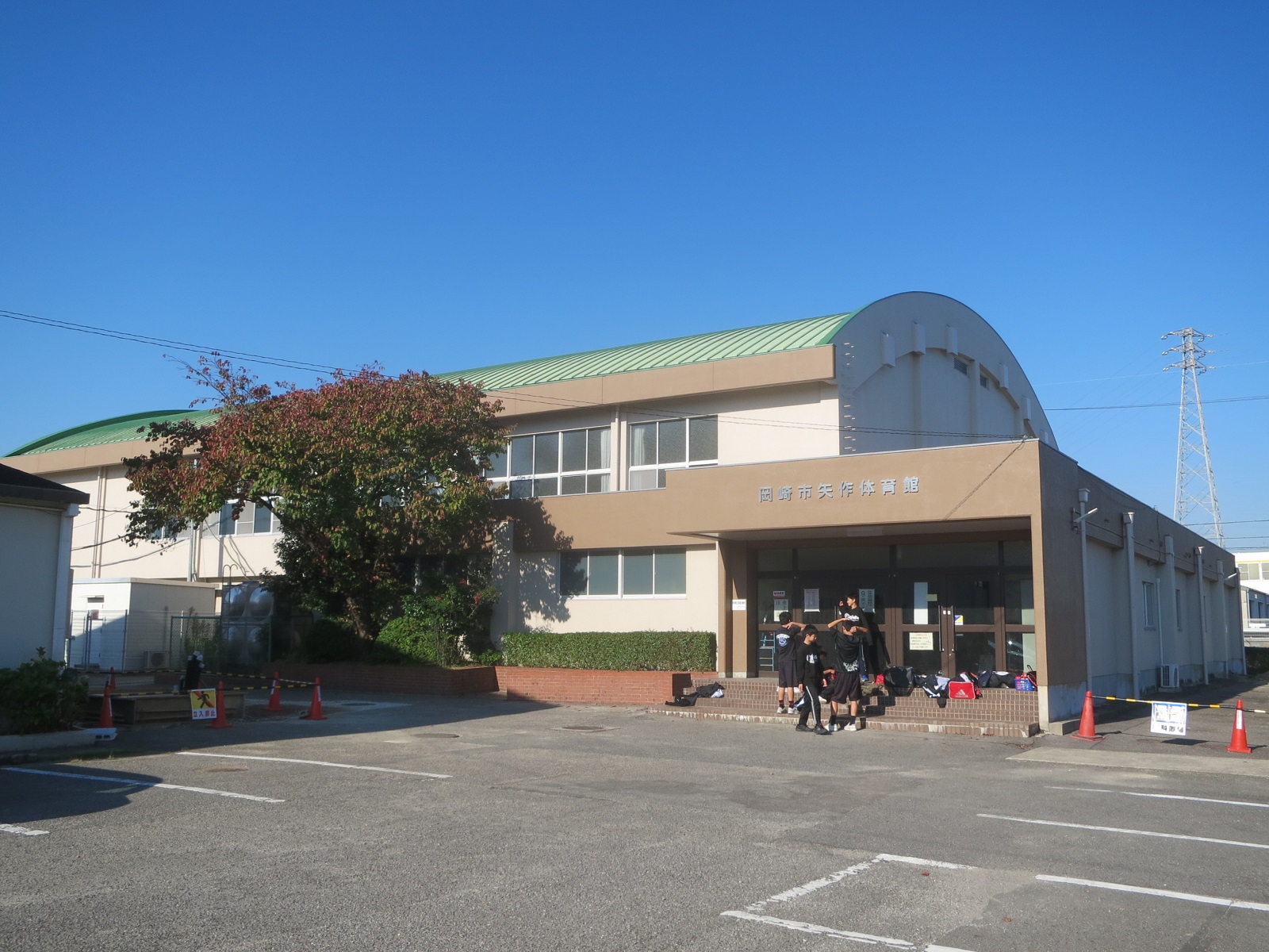 岡崎市矢作体育館（岡崎市宇頭町）